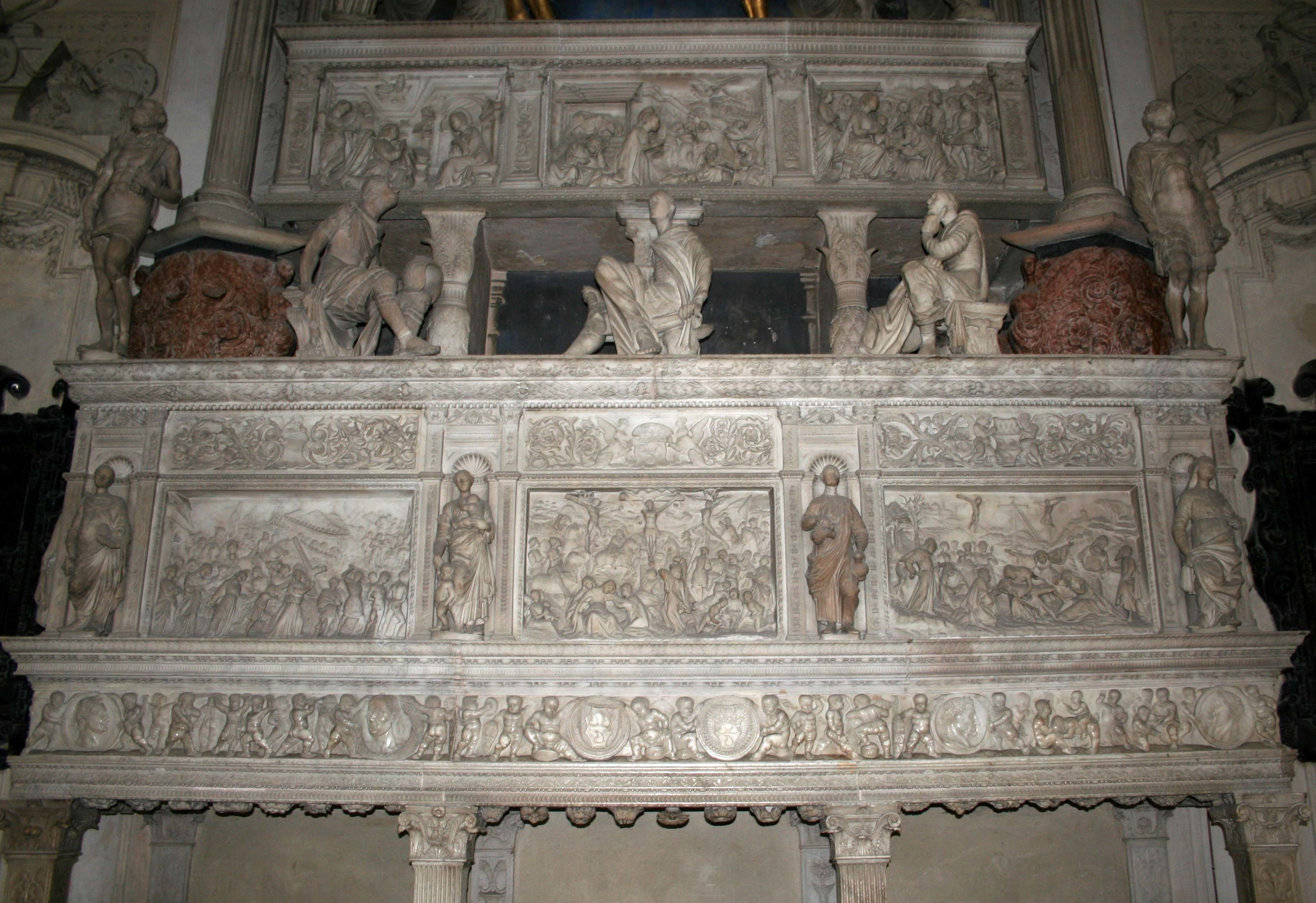 Bergamo, Cappella Colleoni, monumento funebre a Bartolomeo Colleoni. Sarcogago inferiore contenente il feretro del condottiero. Particolare del sepolcro, opera di Giovanni Antonio Amadeo. Fotografia di Giorces.